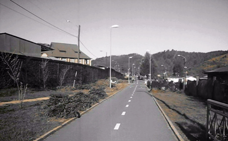 Ciclovía Temuco-Labranza junto al Regimiento Tucapel.